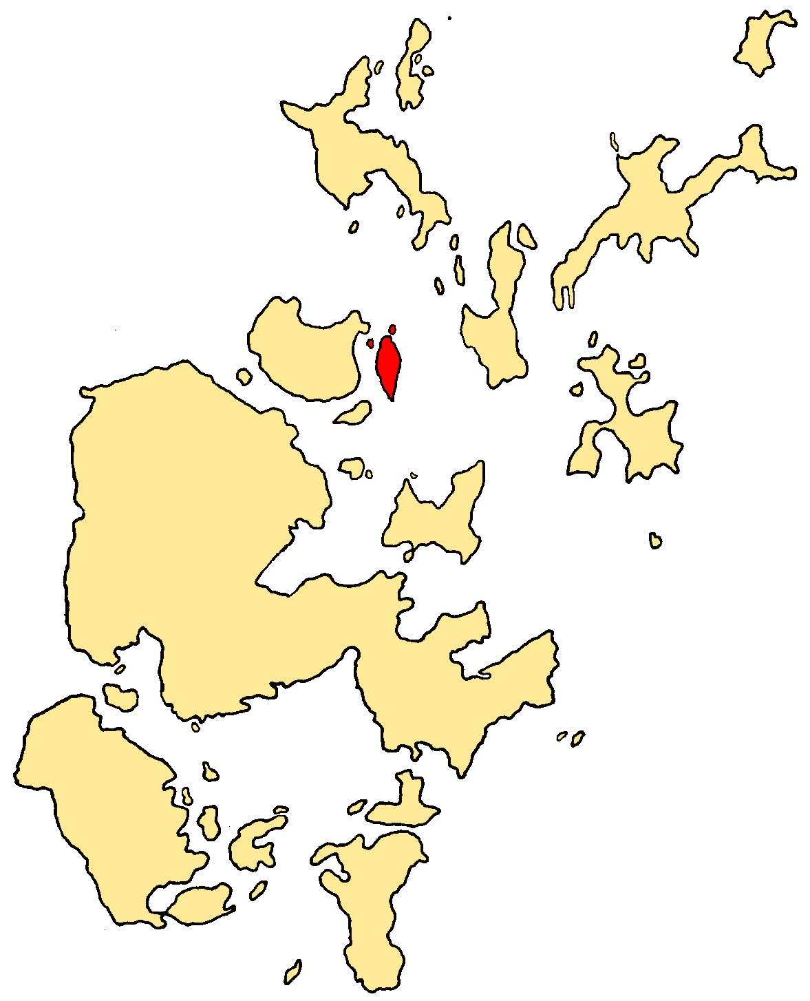 Egilsay, Orknøyene